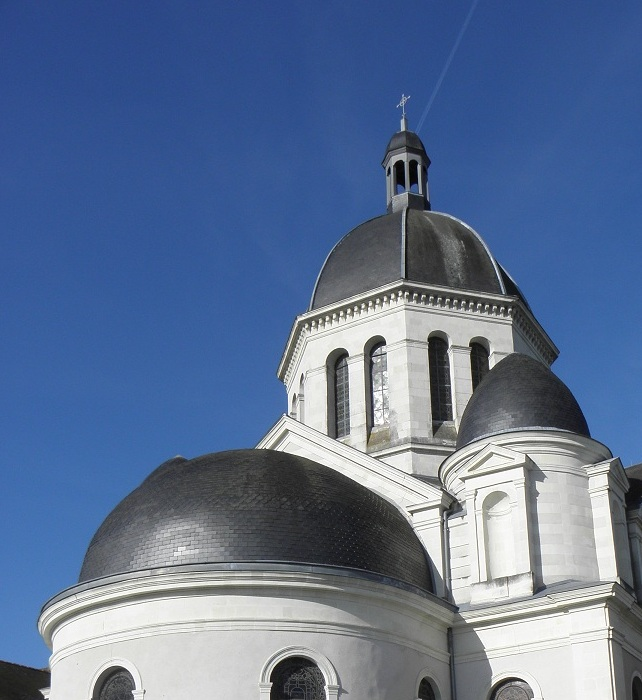 Coupole et abside de l'église de La Madeleine à Segré (49). .